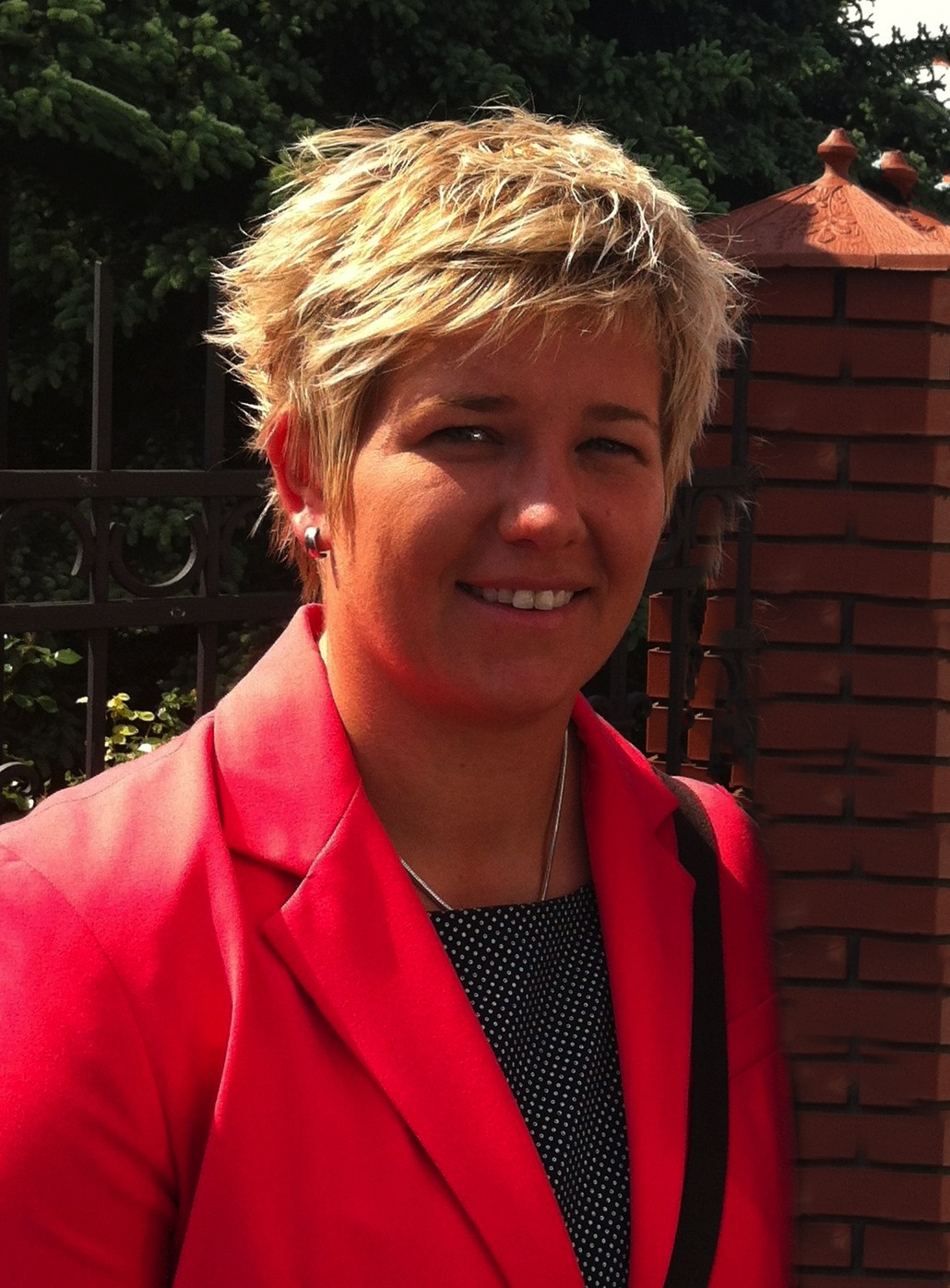 Anita Włodarczyk w Warszawie